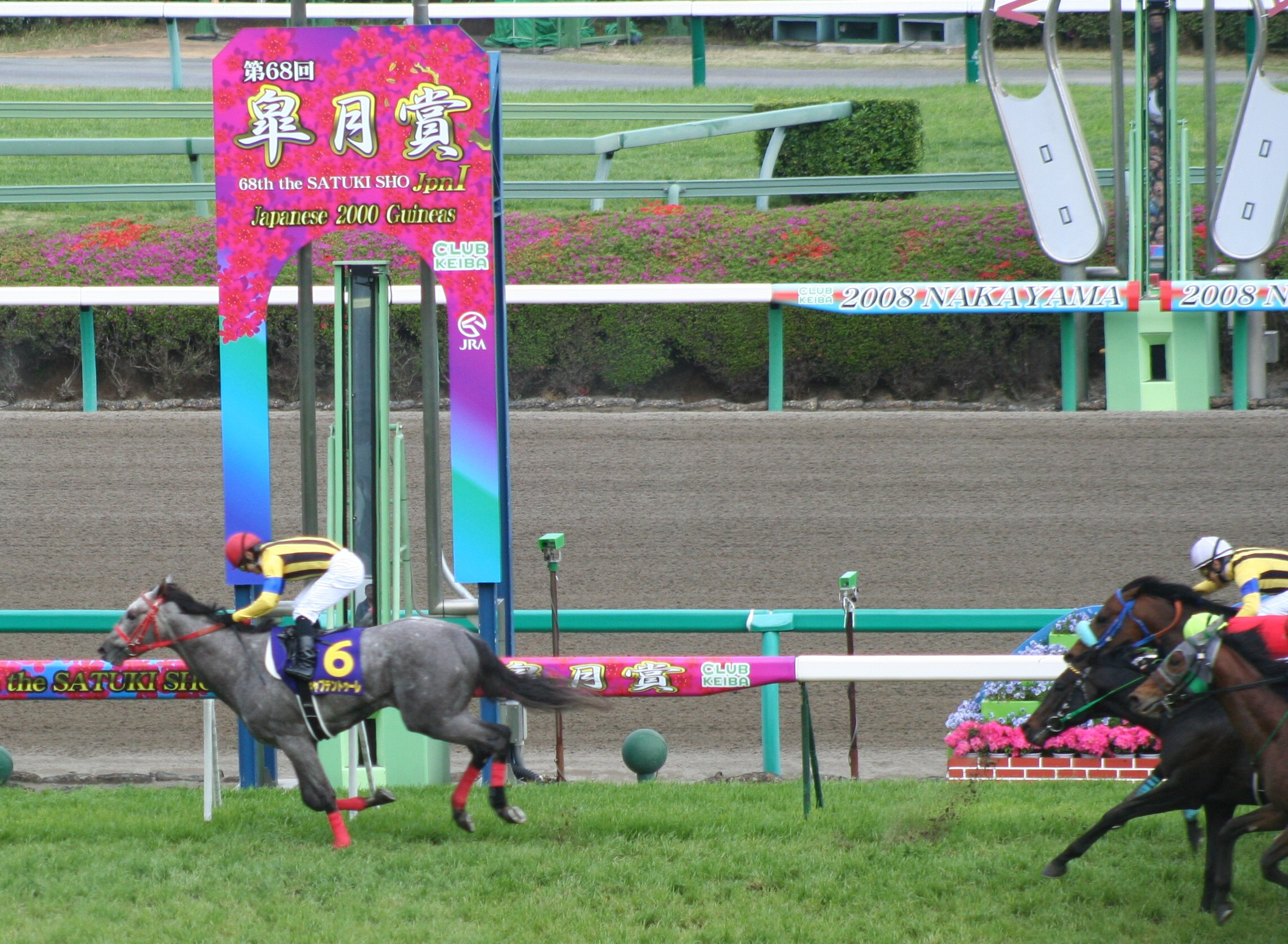 第68回皐月賞 (68th Satsuki Sho)